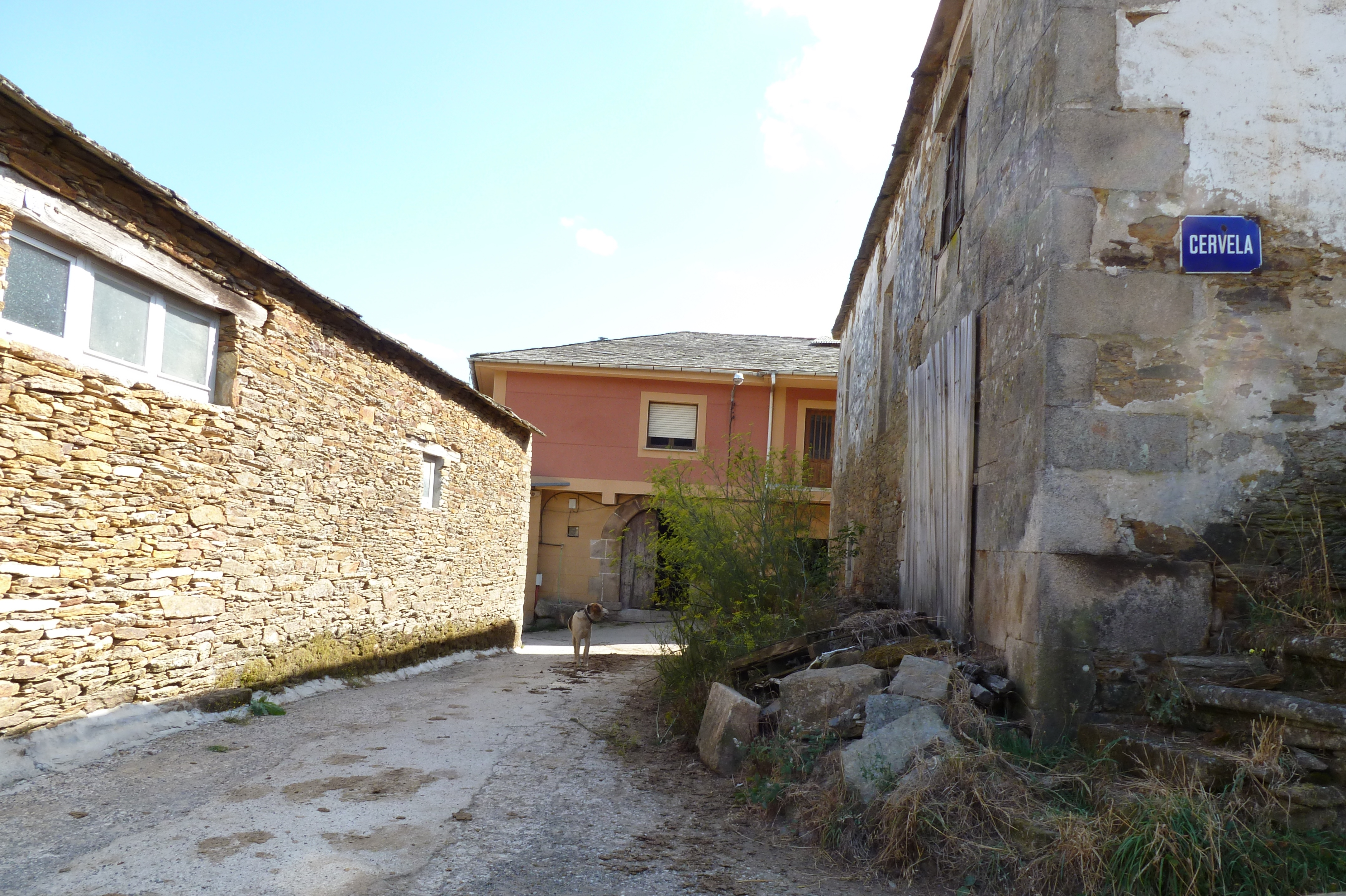 Lugar da Cervela, na parroquia da Cervela, concello do Incio, Lugo